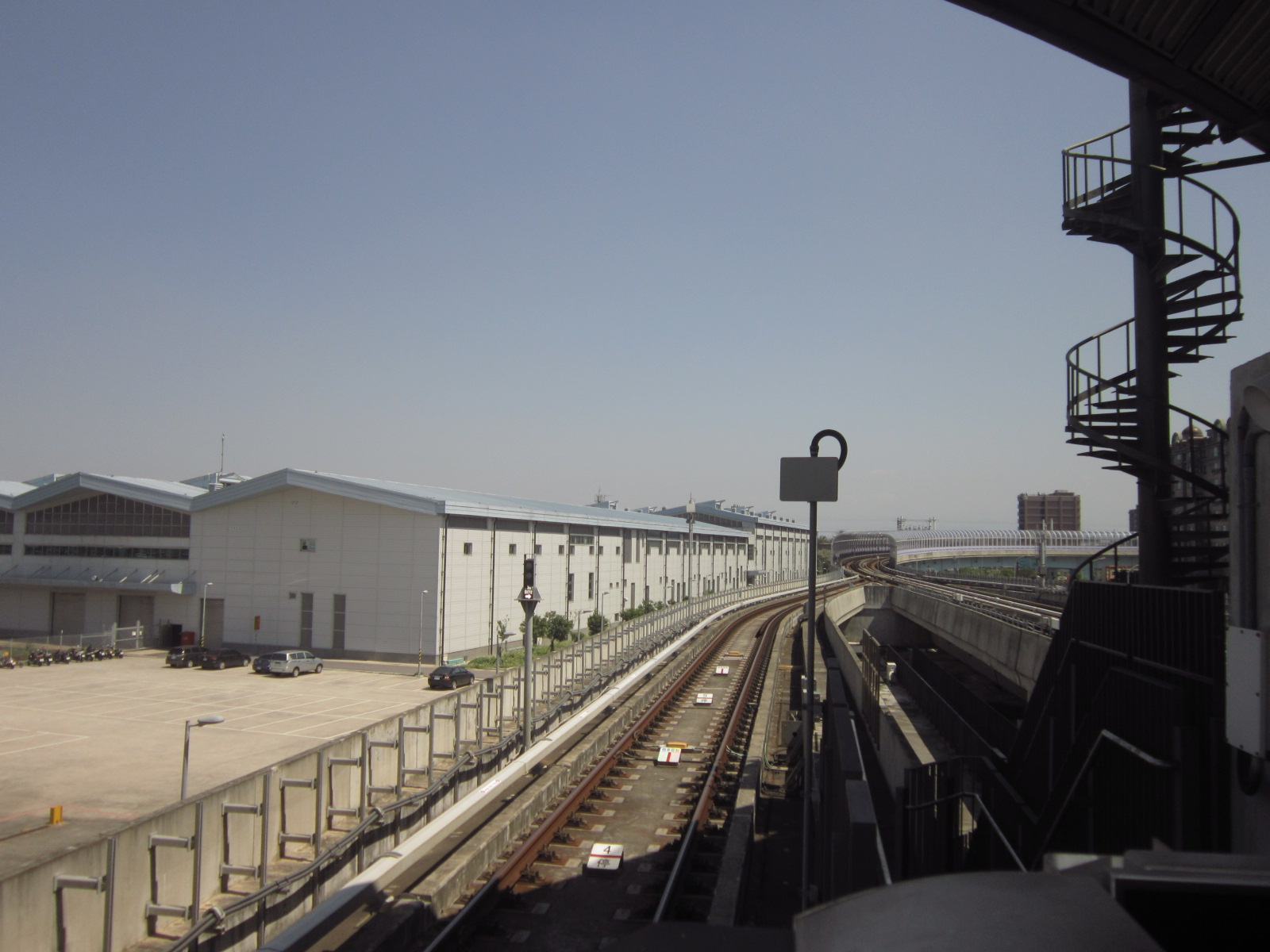 由青埔機場經過領航站月臺的股道